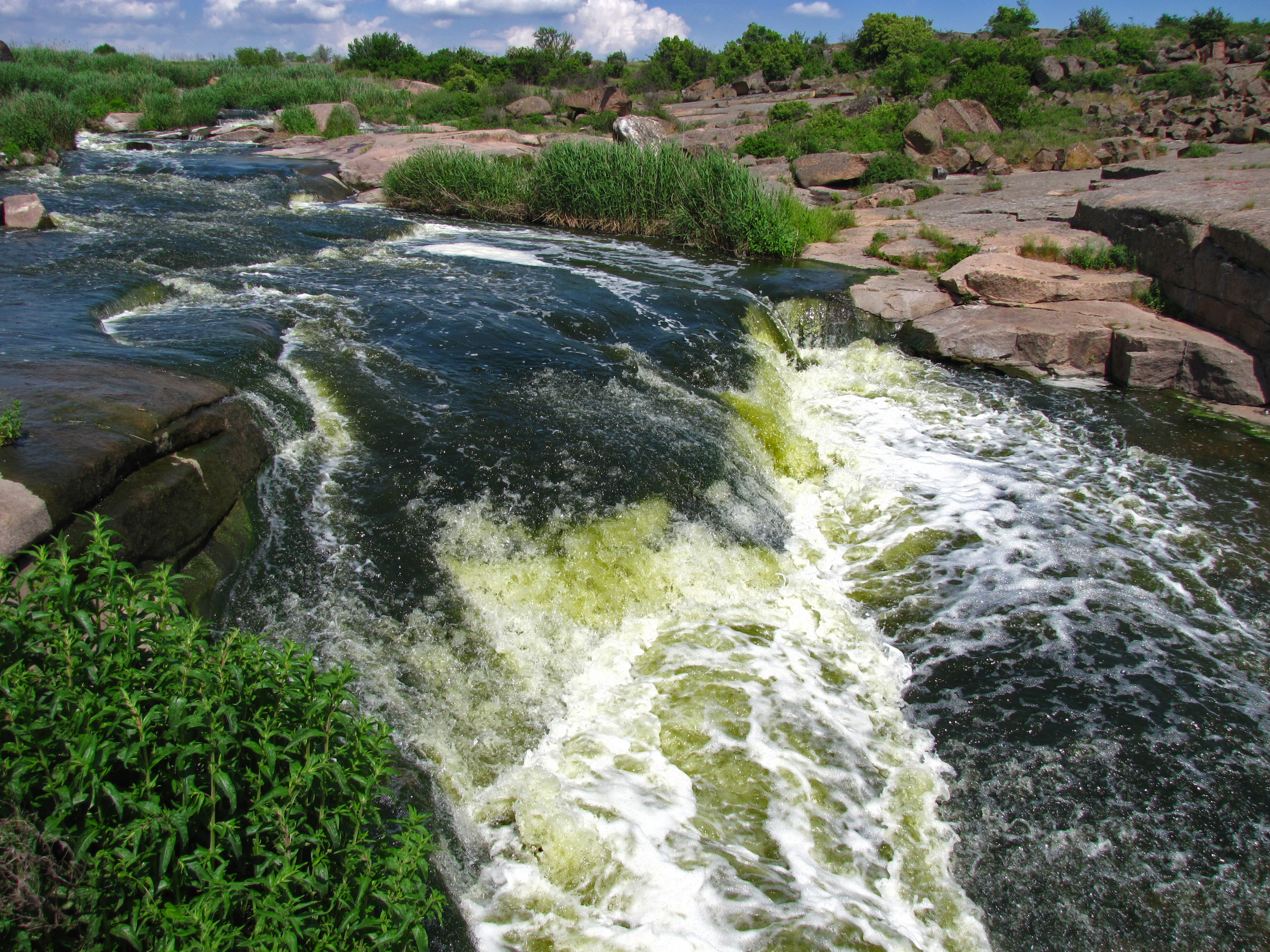 Водопад на р. Кам'янка, Апостолівський р-н, 2,5 км північно-східніше с. Червоний Тік